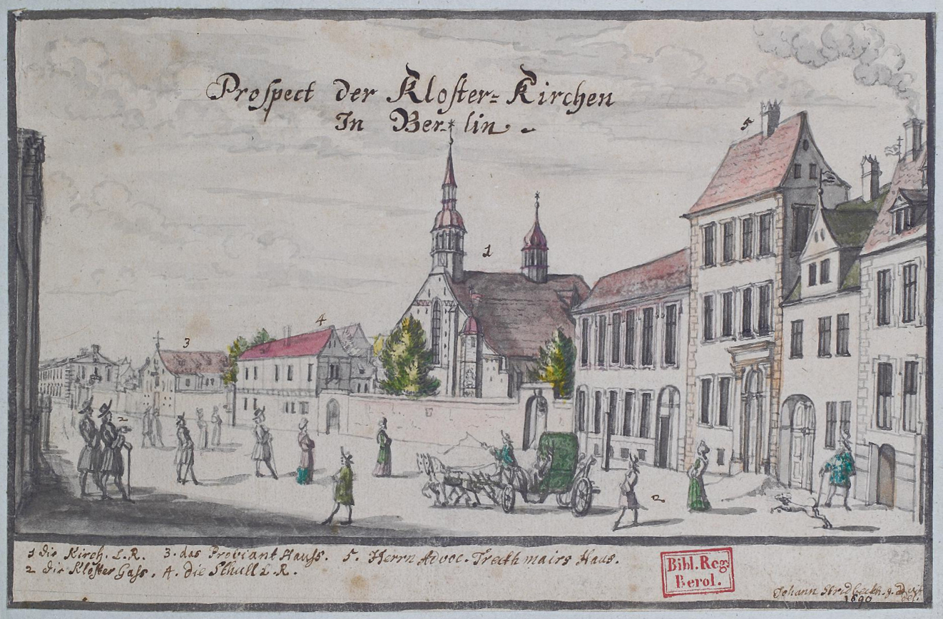 Watercolour sketch of Klosterstrasse and the Klosterkirche in Berlin from "Die Stadt Berlin im Jahre 1690"